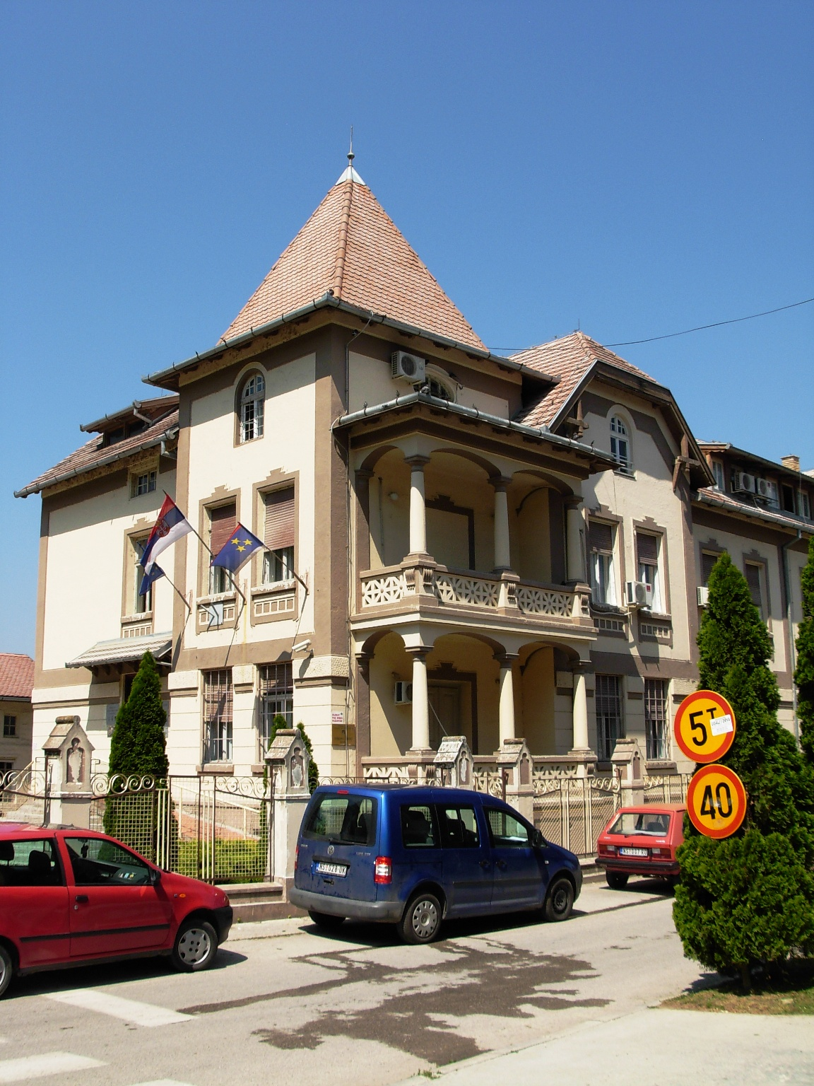 Zgrada skupštine opštine Beočin.